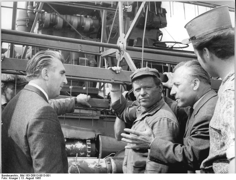 LPG Groß-Schulzendorf, Besuch durch Georg Ewald Zentralbild Krueger Ku-Ke 13..865 Minister Ewald bei Genossenschaftsbauern von Groß-Schulzendorf Als erster Kreis der Republik erfüllte Zossen am Freitag den Staatsplan in Getreide. Bei einer Kontrollfahrt durch dieses Gebiet des Bezirks Potsdam wurde dem Vorsitzenden des Landwirtschaftsrates der DDR, Minister Georg Ewald, von dieser vorbildlichen Leisung des Kreises Zossen berichtet. Auf unserem Bild sind vlnr: Minister Ewald, Mähdrescherfahrer Kurt Wannegat und der Vorsitzende des Rates des Bezirkes Potsdam, Herber Puchert, im Gespräch.